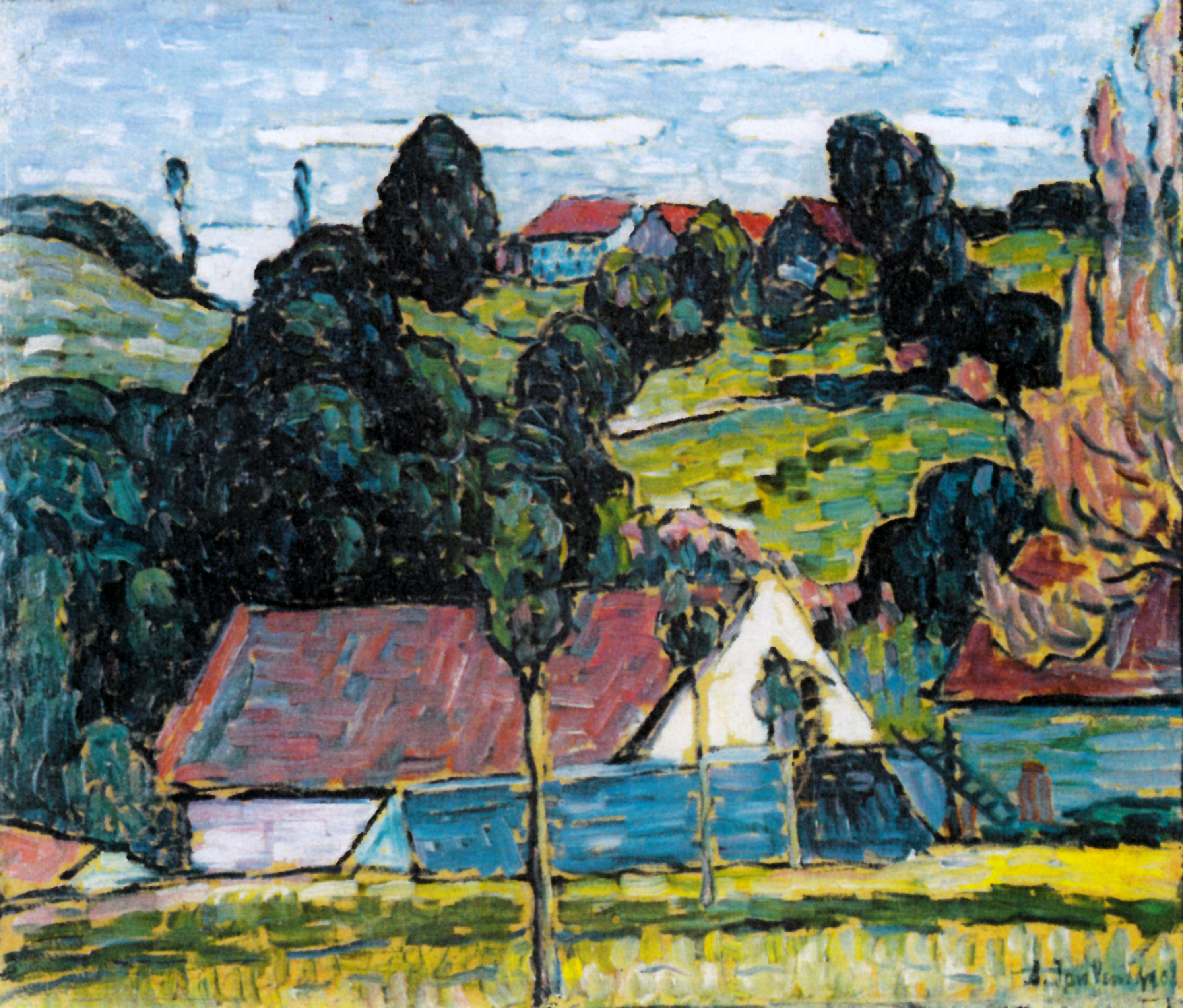 Bei dem Landschaftsgemälde Sommertag von Alexej Jawlewnsky handelt es sich um ein Ölgemälde auf Karton im Breitformat. 45 x 53,7 cm. Unten rechts signiert A. Jawlensky und datiert 07. Rückseitig verschiedene Aufschriften, u.a. mit blauem Kopierstift Sommertag. Museum Wiesbaden, Inventar-Nummer: M 802